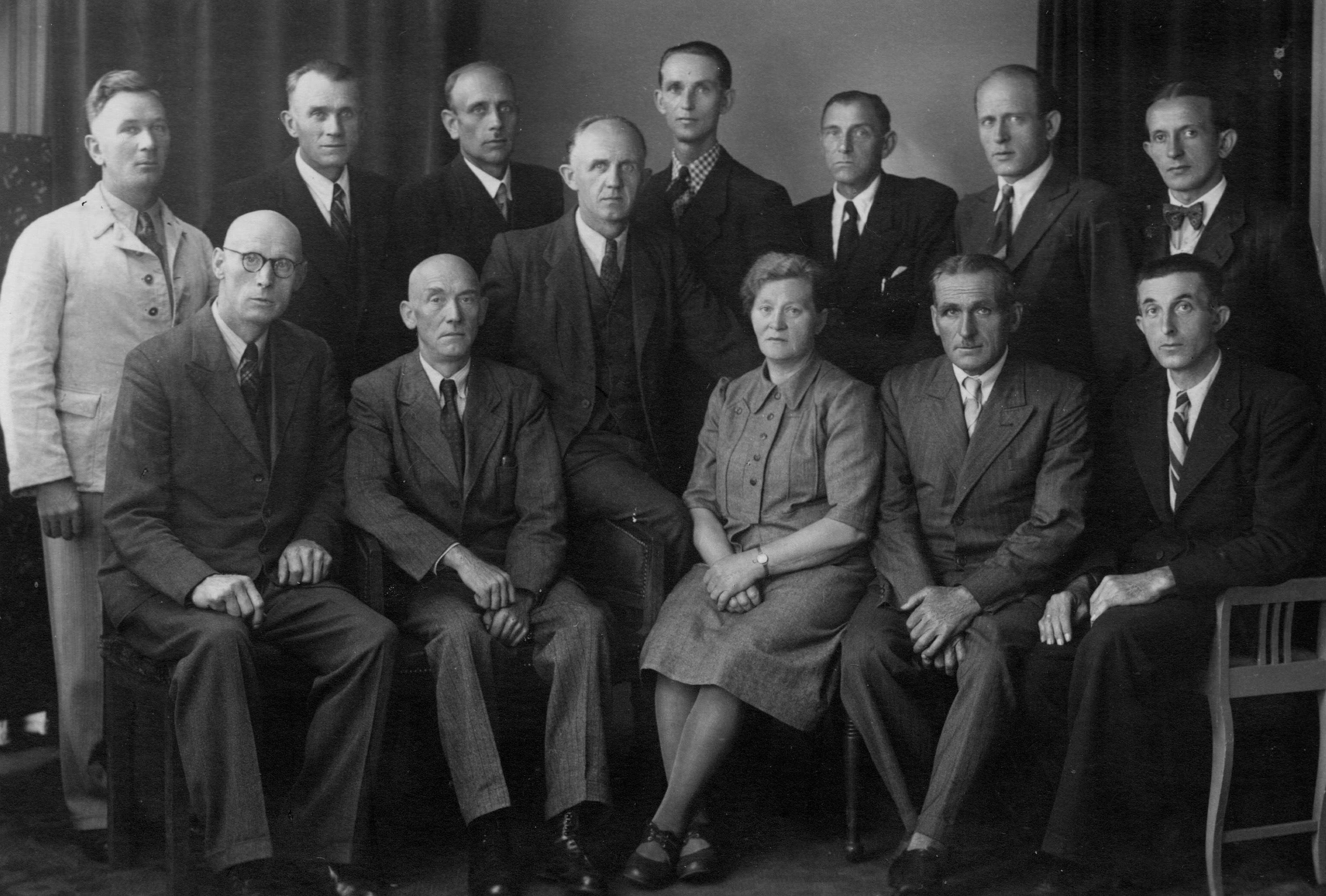 Mitglieder der Sozialausschuss der Stadt Gronau/Westf., Aufgenommen ca. am 1948, auch mit Mitglieder von KPD-Ortsgruppe Gronau, 1. Reihe, 2. v. rechts: Carl (Karl) Domke KPD; 3. v. rechts: Elli Domke KPD: 1. v. links: Heinrich Schmitz KPD und Rudolf Steffens (Senior) KPDPrivatarchiv: Sahin Aylin